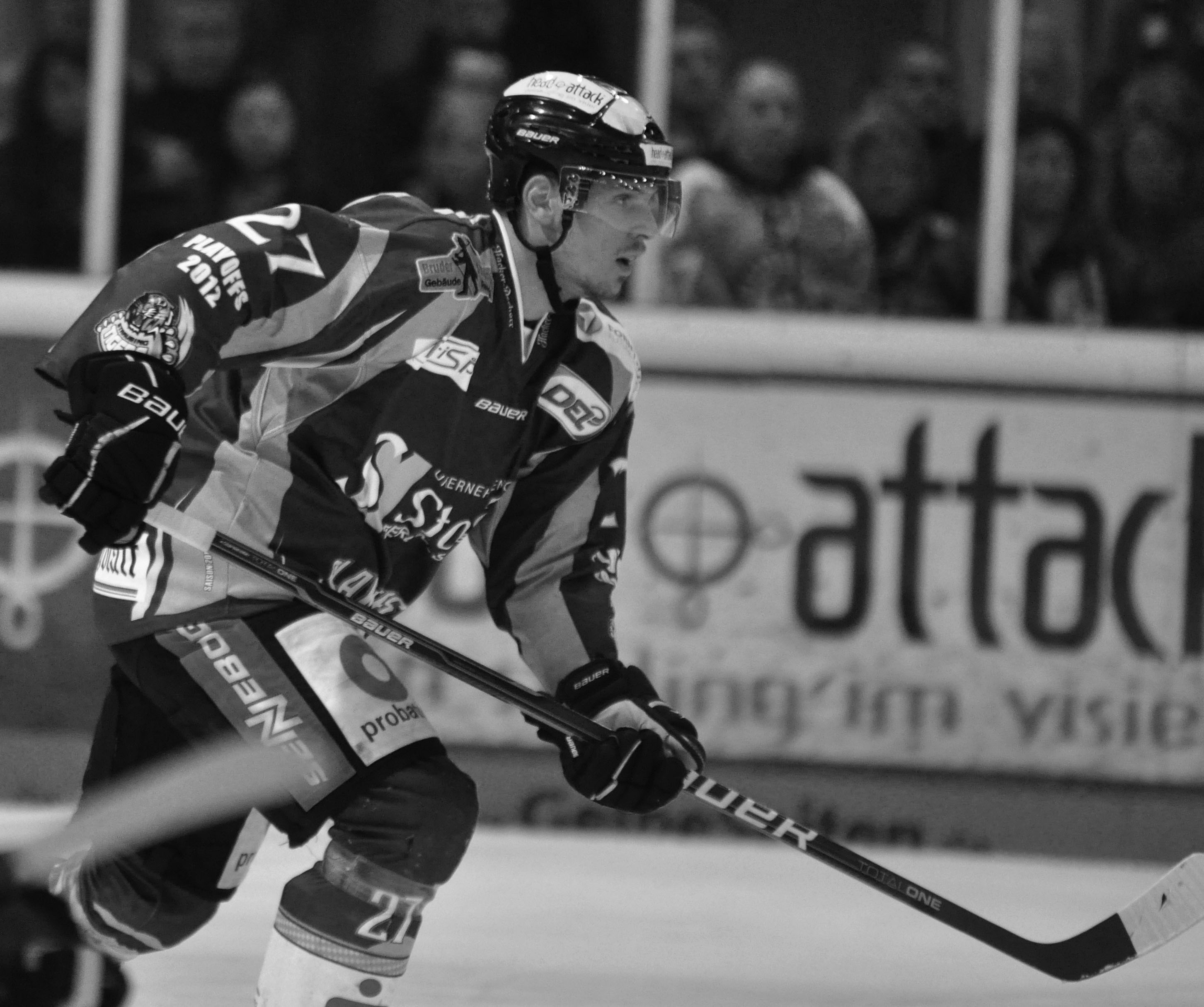 Straubing Tigers - Eisbären Berlin 07.04.2012 DEL PlayOff Halbfinale